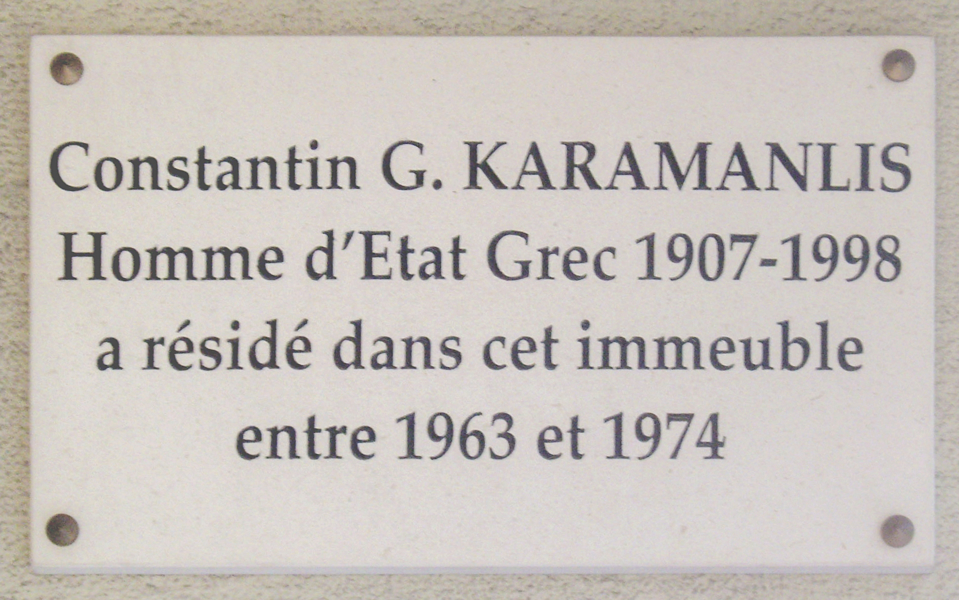 Plaque commémorative, 21 boulevard de Montmorency, Paris 16e. « Constantin G. Karamanlis, homme d'État grec, 1907-1998, a résidé dans cet immeuble entre 1963 et 1974. »